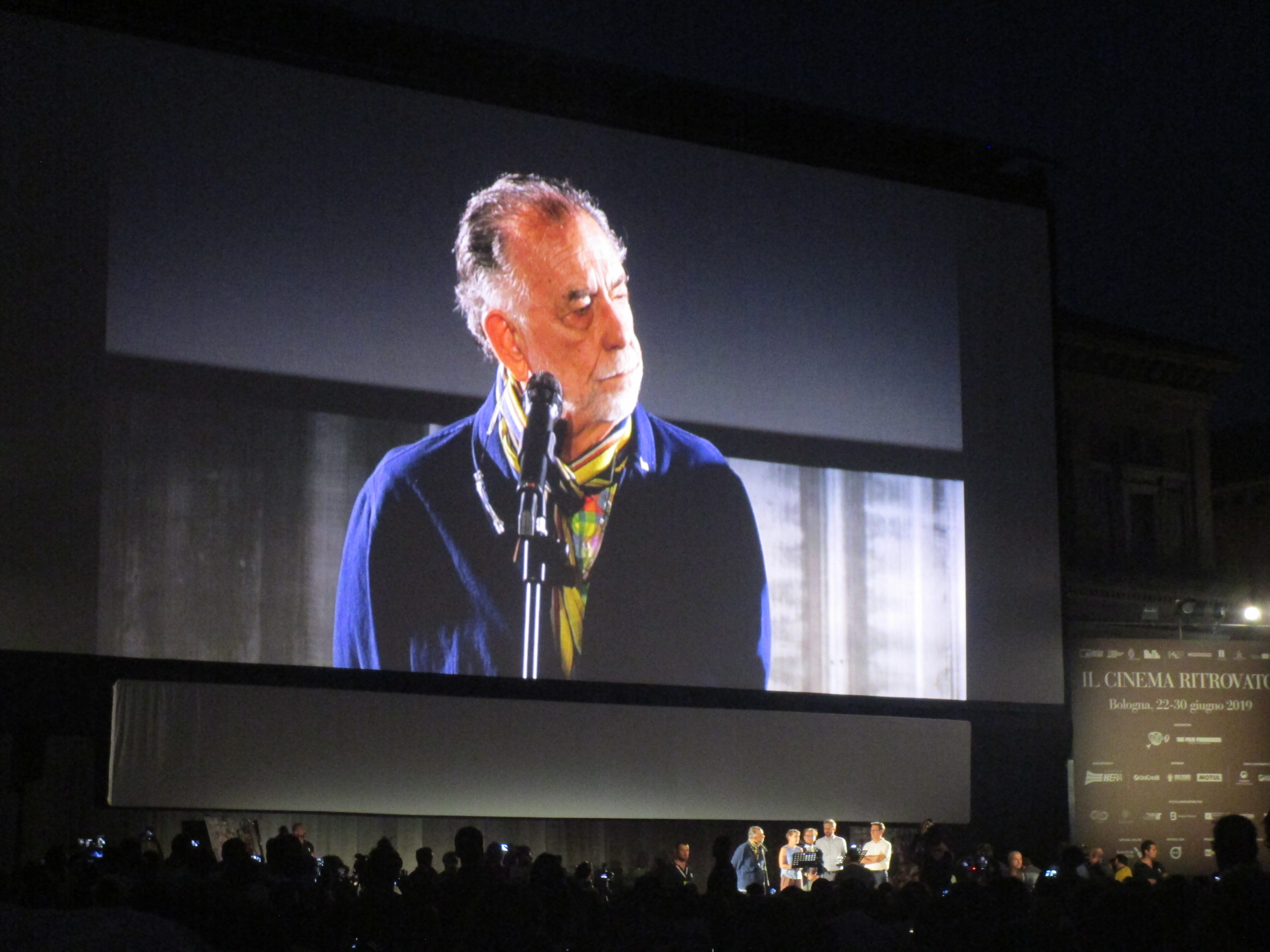 Francis Ford Coppola presenta a Bologna il Final Cut di Apocalypse Now (28 giugno 2019)